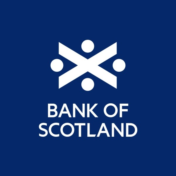 Bank of Scotland, İskoçya Bankası ana banka logosu